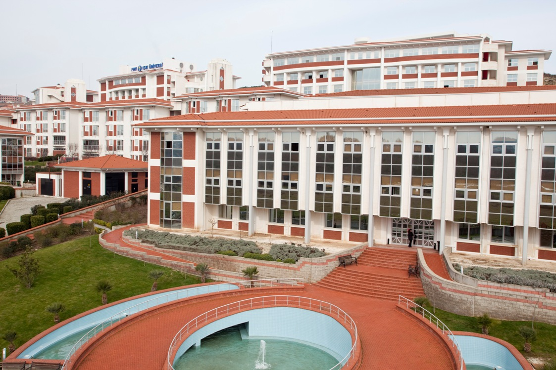 Işık Üniversitesi Şile Kampüsü